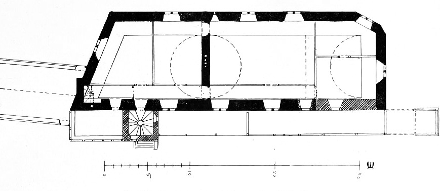 Erdgeschossgrundriss des Wohnbaus vom Alten Schloss in Grevenbroich Ende des 19. Jahrhunderts